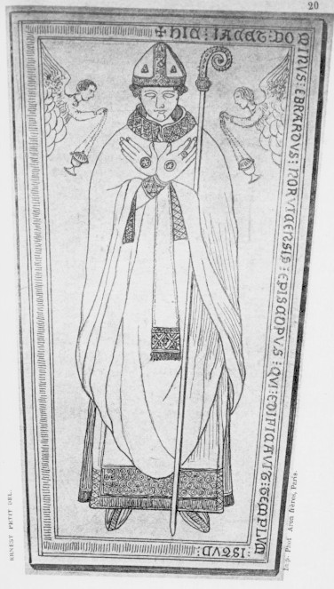 Ebrard ou Everard de Calne, évêque de Norwich